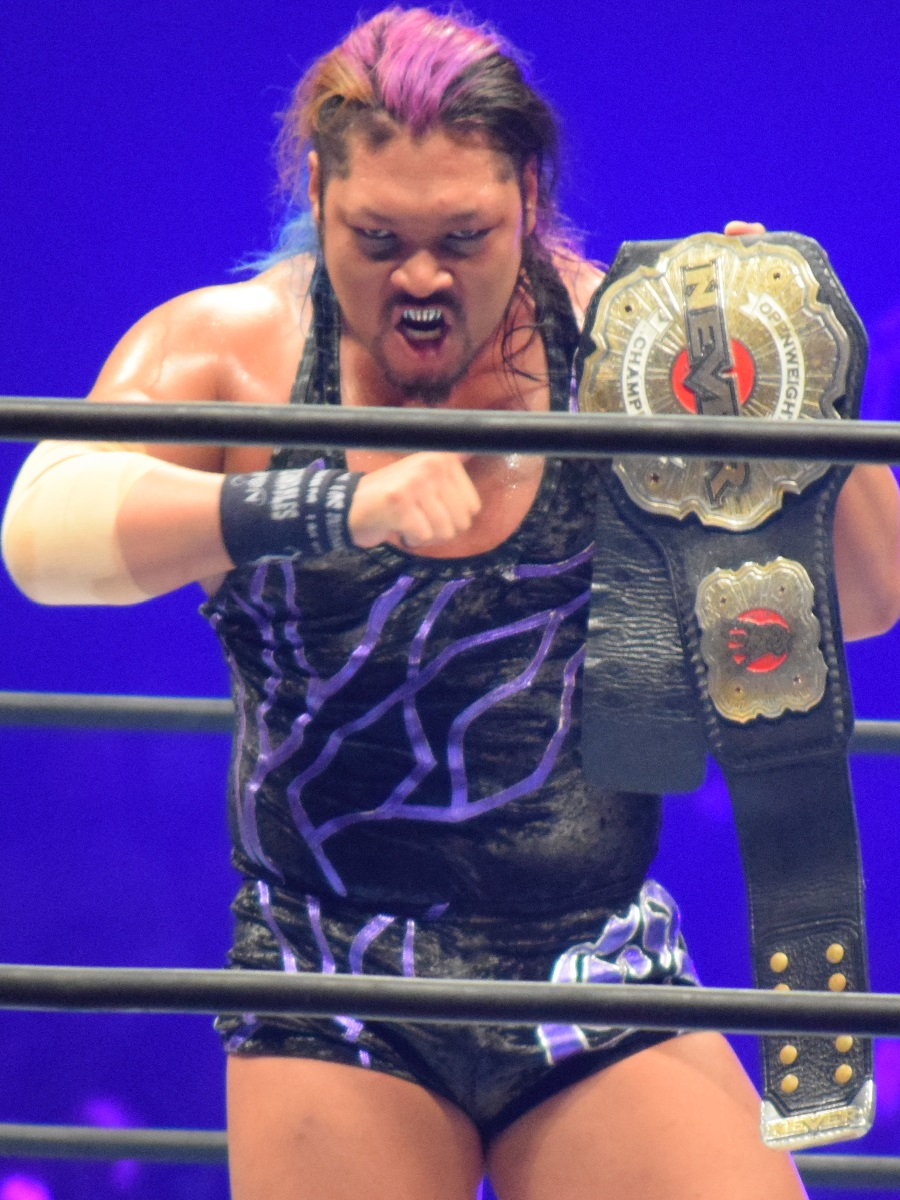 2016年11月5日 大阪府立体育会館「POWER STRUGGLE」 EVIL